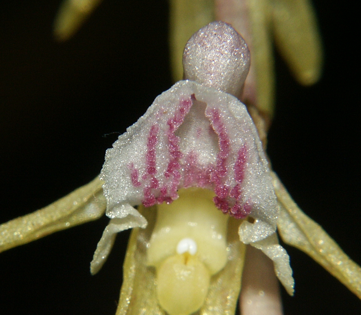 Epipogium aphyllum, Baar, Germany